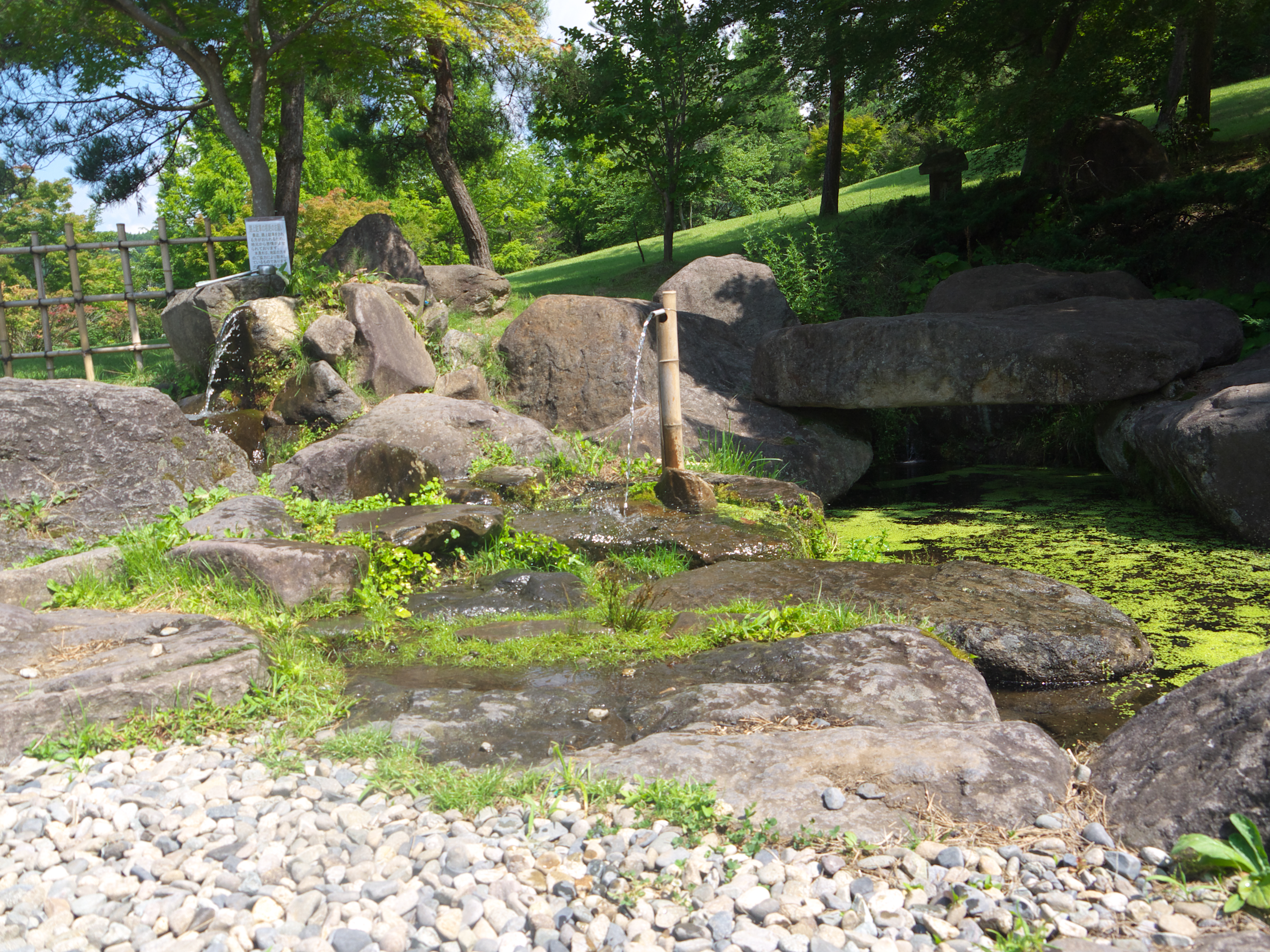 慧日寺資料館庭の名水の導水